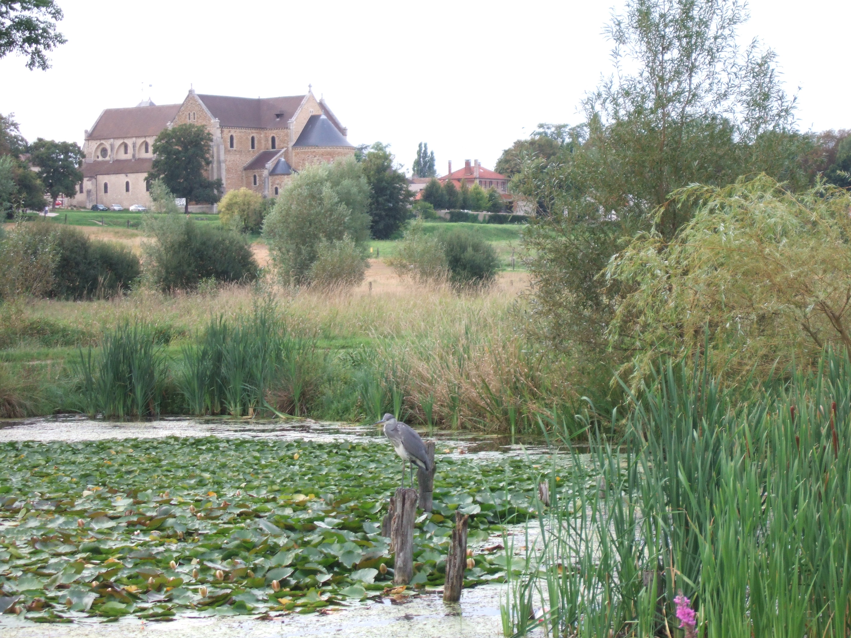 Photographie de la basilique de Longpont prise le 1er septembre 2006 par Yves Fraysse